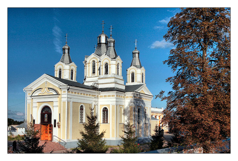 Кобрынскія краявіды